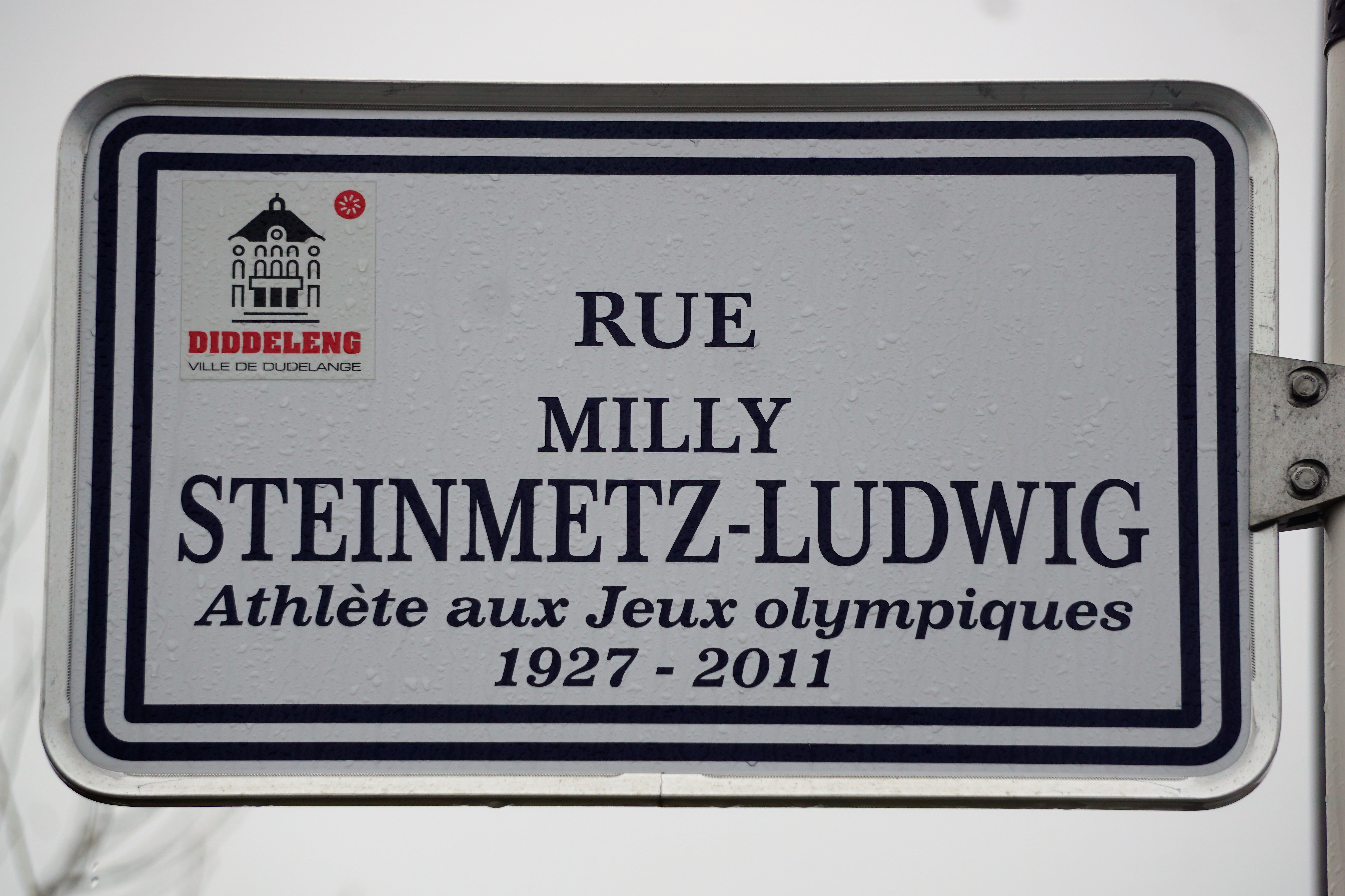 Plaque de nom de rue à Dudelange, quartier Lenkeschléi.